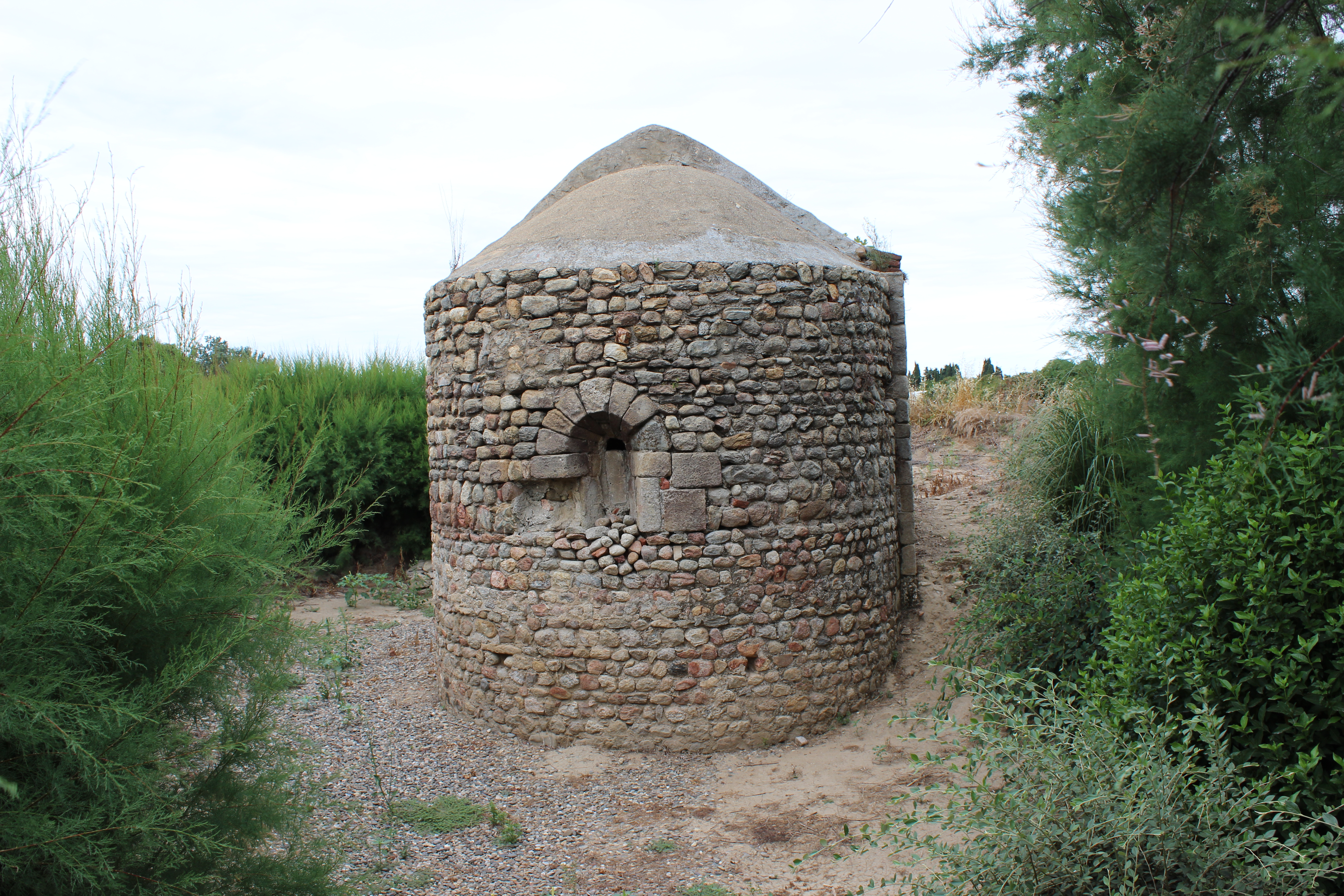 Église Sainte-Eugénie de Tresmals, abside